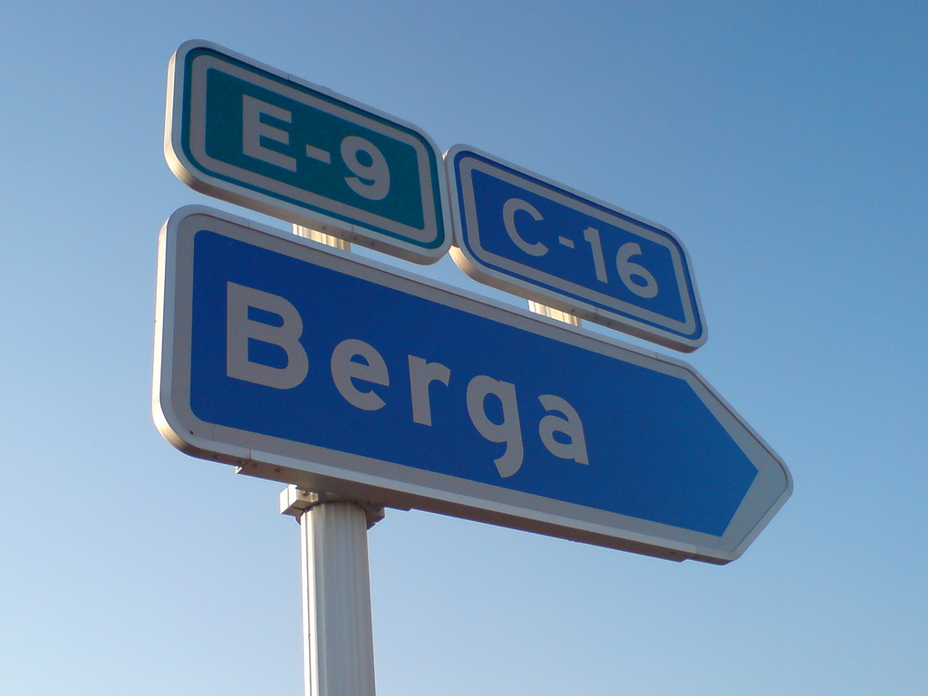 Cartell d'enllaç cap a BergaC16_DirBerga